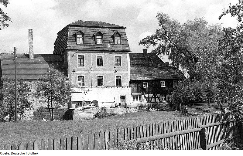 Original image description from the Deutsche Fotothek Rietschen-Viereichen-Mocholz. Ehem. Mühle